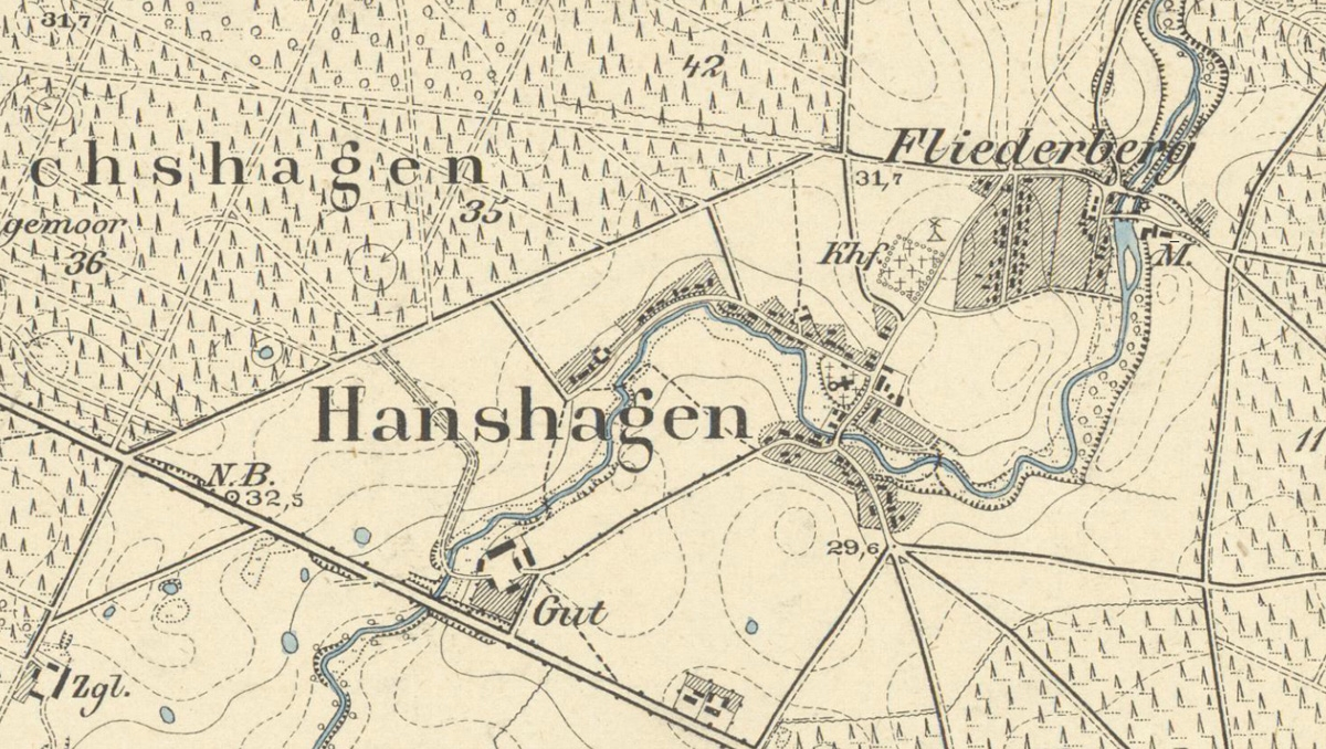 Hanshagen. Ausschnitt aus: Topographische Karte 1887, Aufn. 1885